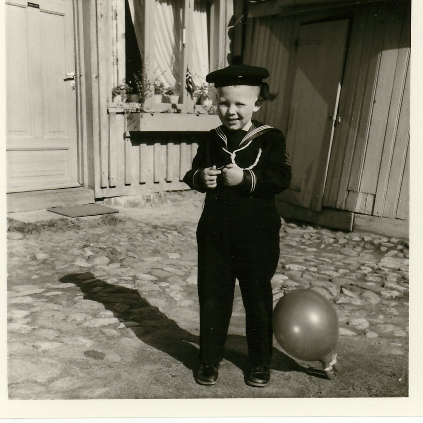 Tor Weidling 17. mai, trolig i 1959. På besøk hos familievenner i Busterudgata, Halden